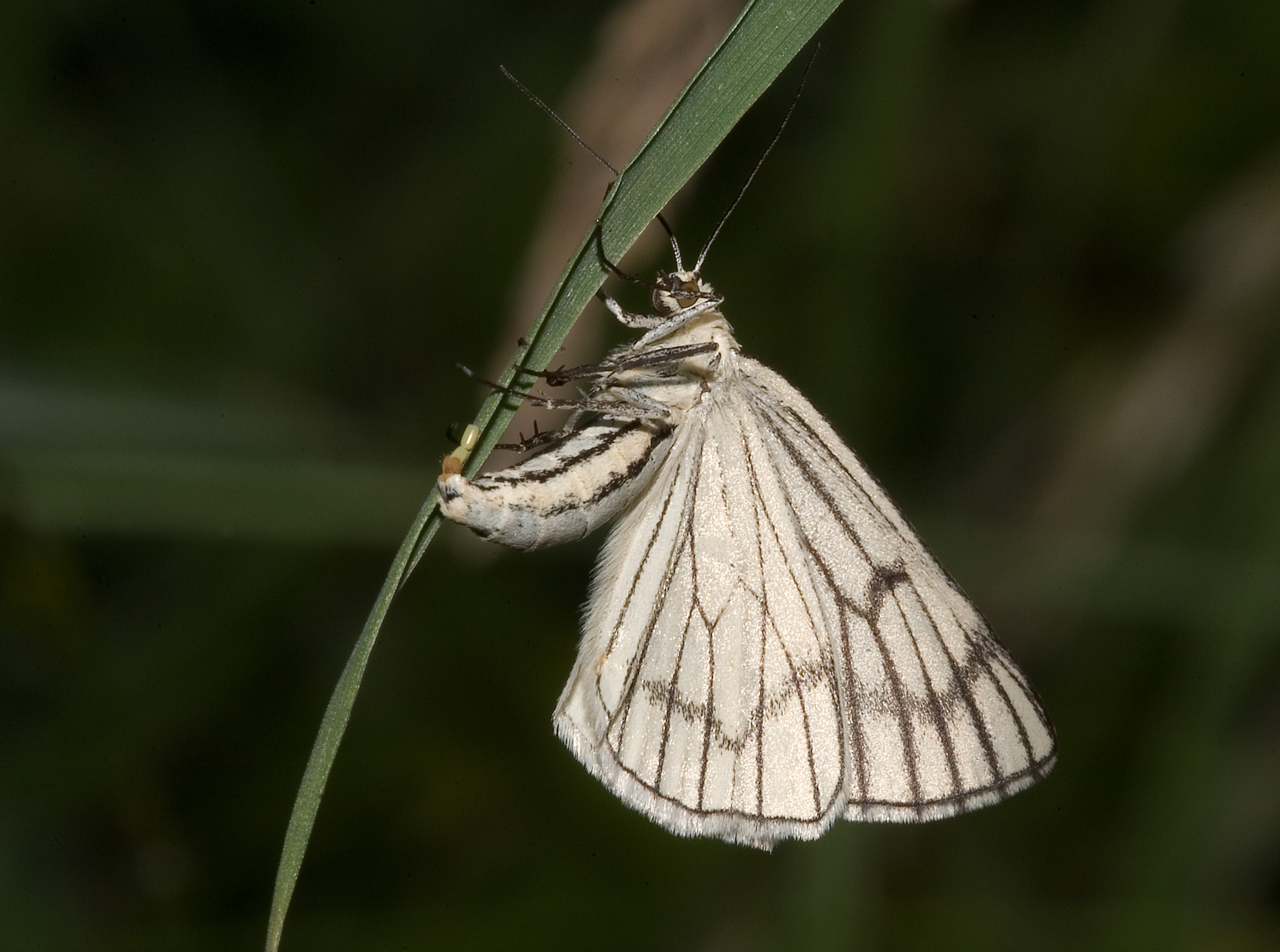 Siona lineata female, laying eggs